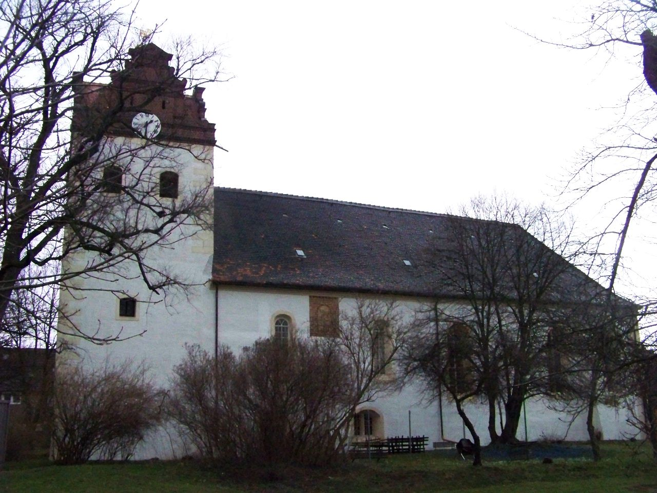 Evangelische Kirche in Löbnitz